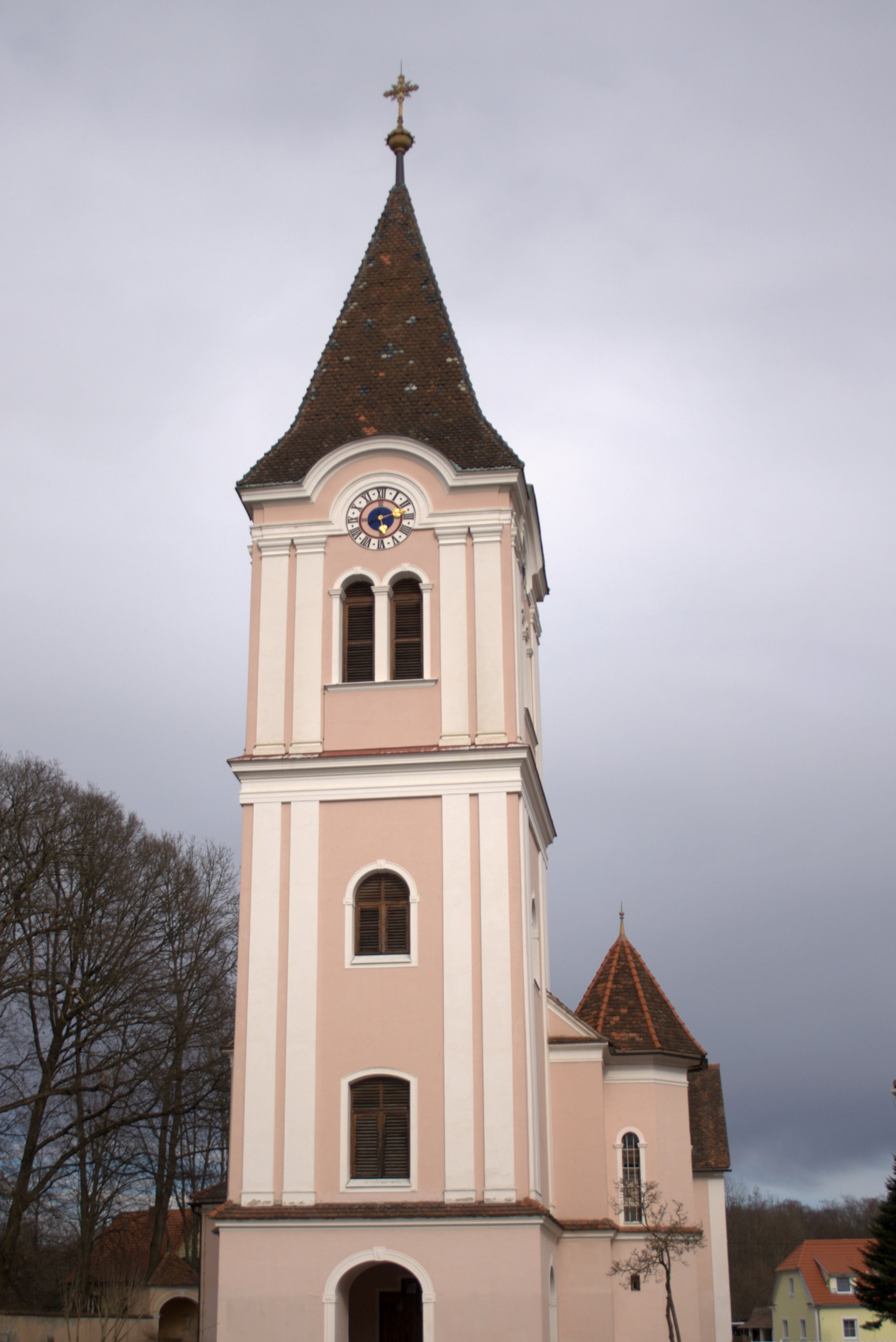 Neudau Kath. Pfarrkirche hl. Andreas